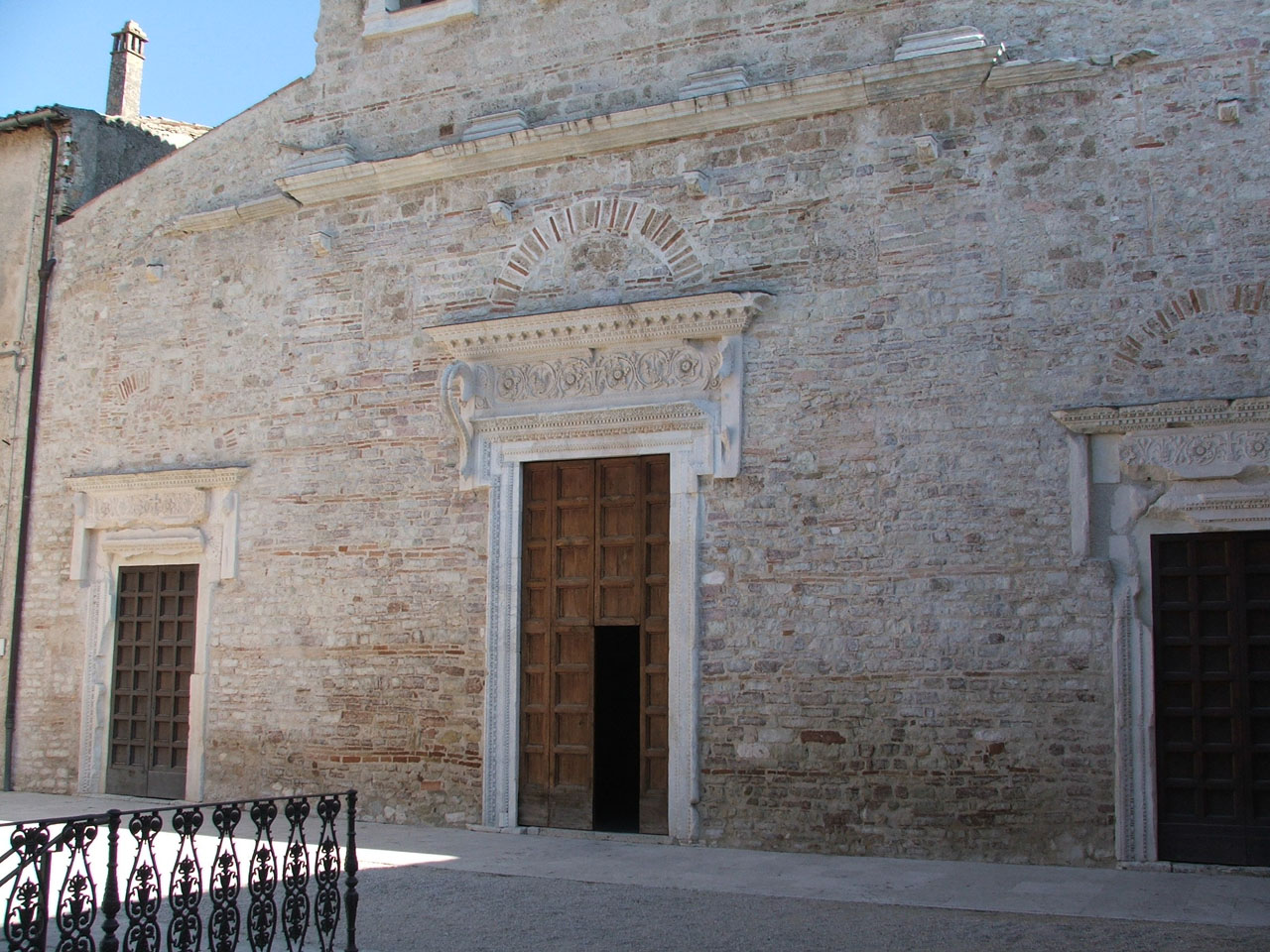 Basilica di San Slavatore (Spoleto) Ldoc